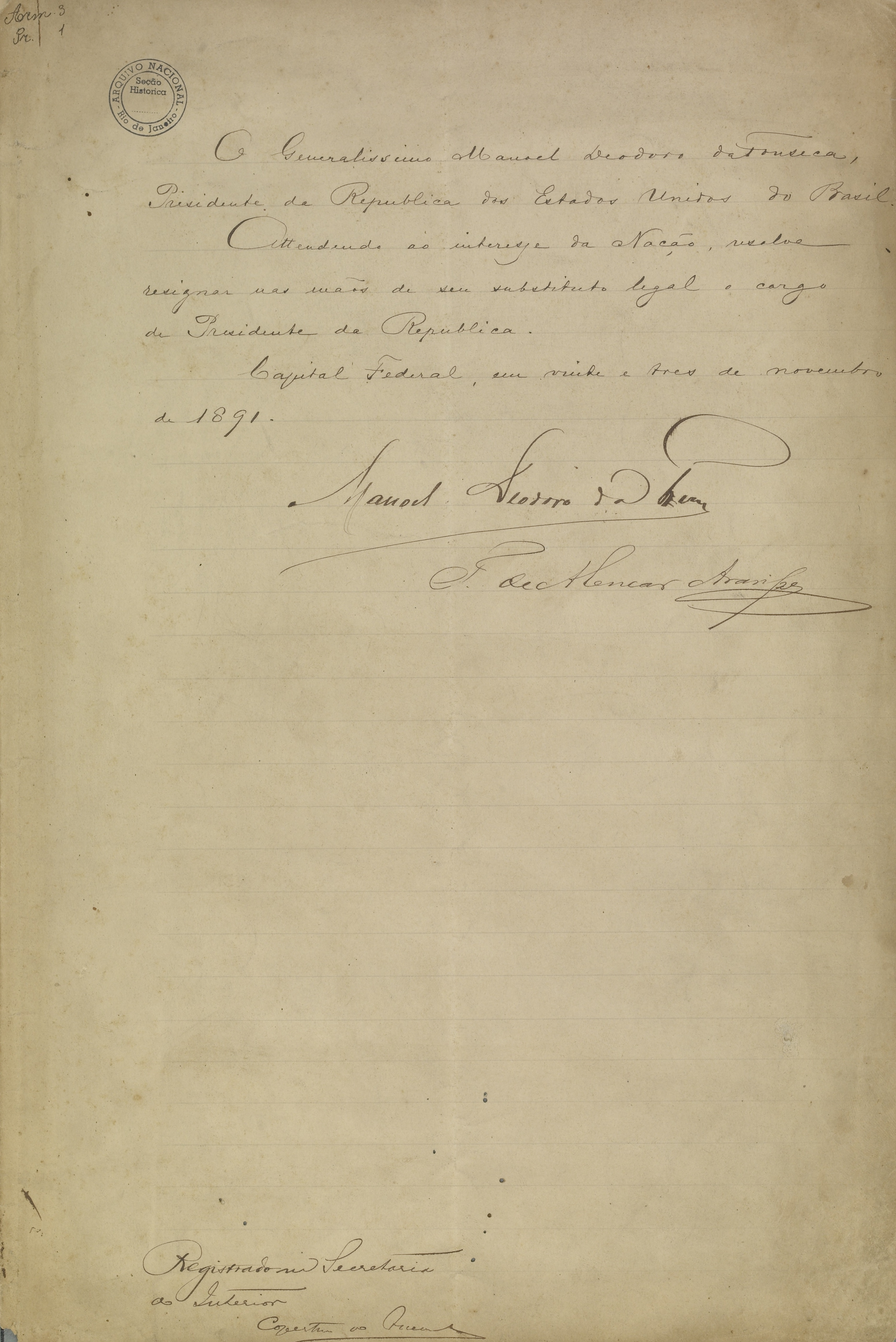 Imagem do Arquivo Nacional.